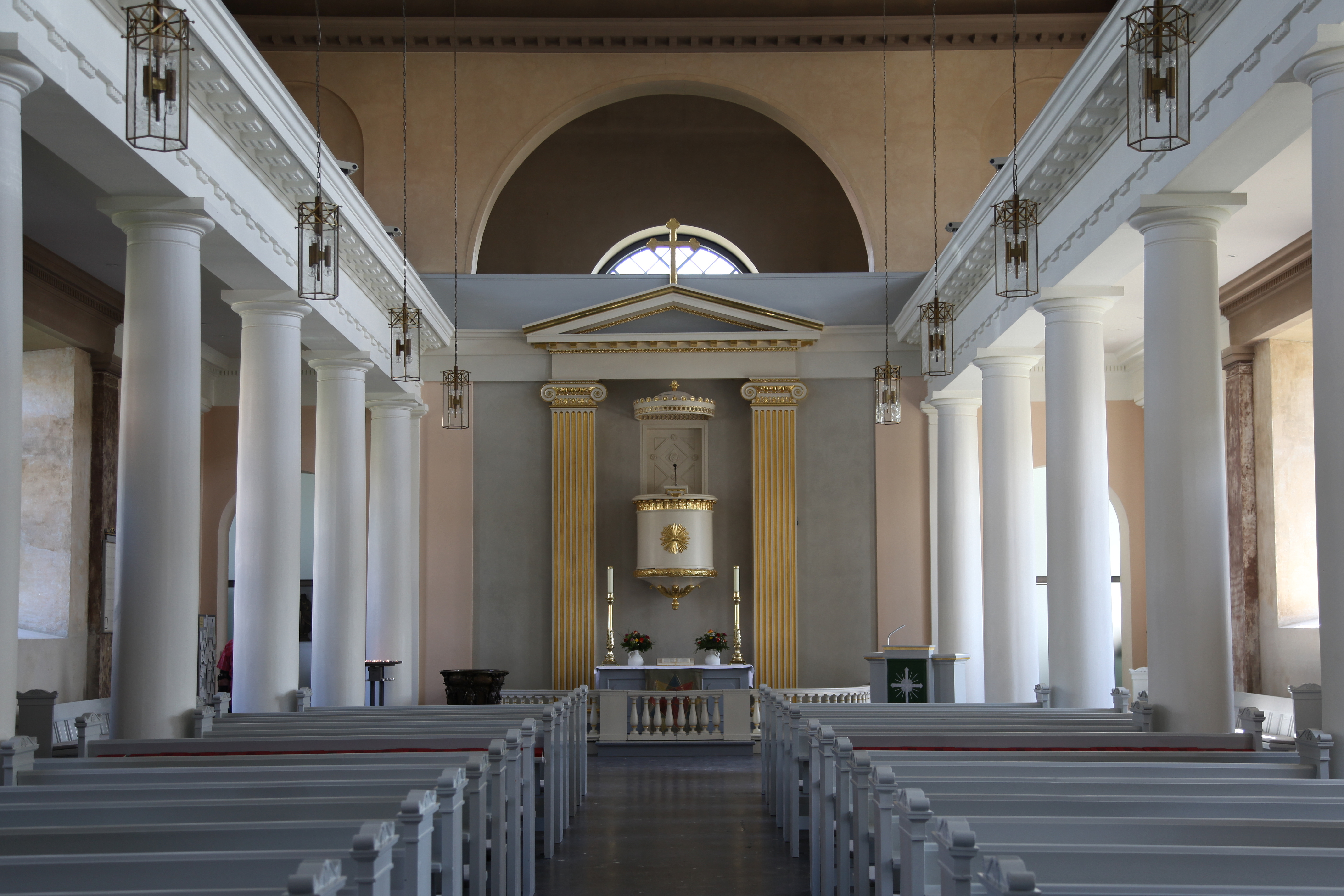 Marienkirche auf dem Markt in Husum